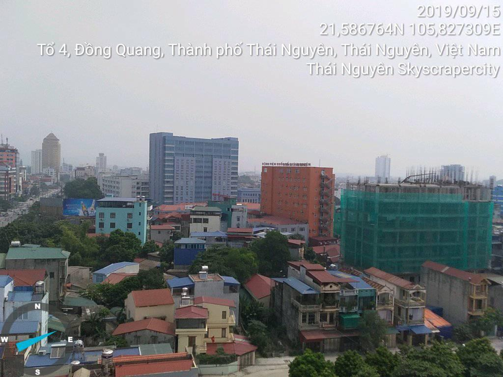 TNskyline